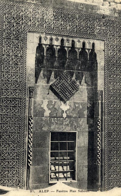 نافذة في خان الصابون في حلب حوالي عام 1900، يتميز بالطراز المملوكي، بني في أواخر القرن الخامس عشر.- سوريا.